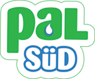 PalSüd şirkətinin loqosu